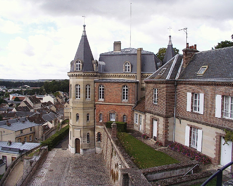 Bilder aus Dreux